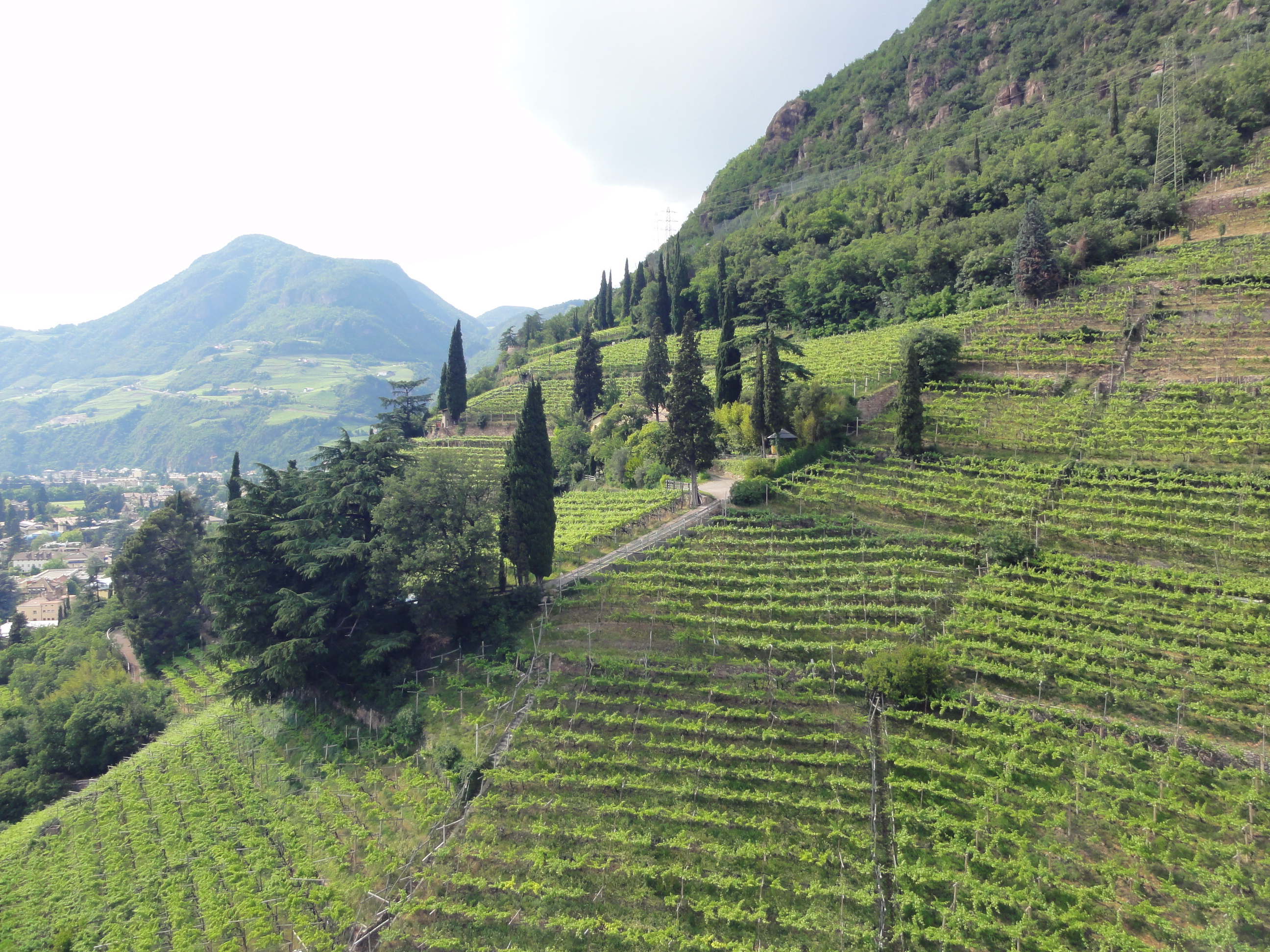 Weinberg in St. Magdalena (Bozen)